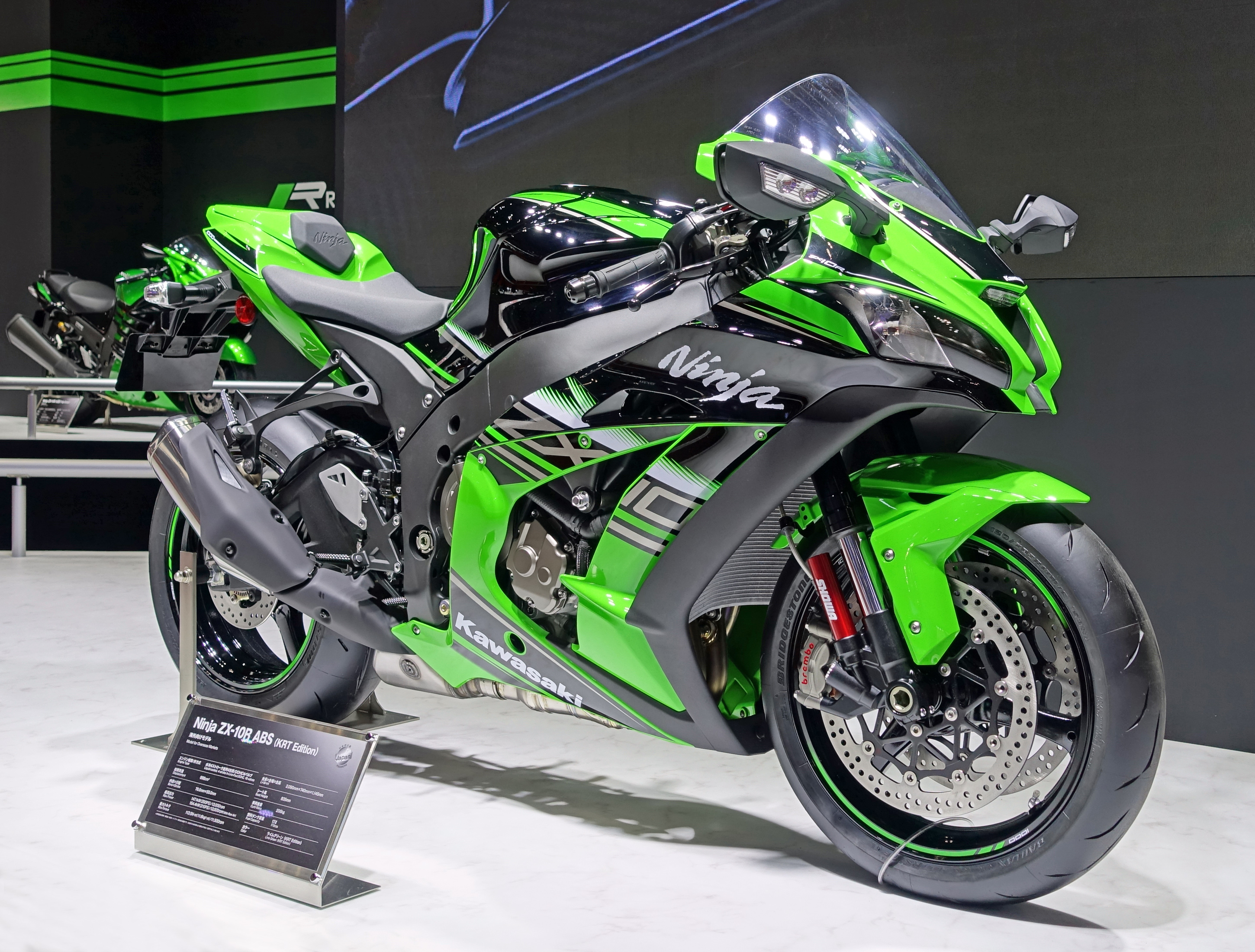 東京モーターショー2015で展示されていたカワサキ・ニンジャZX-10R ABS (KRT Edition)